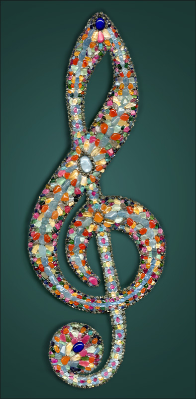 Violinschluessel aus Edelsteinen und Schmucksteinen (gemstones) von Claudia Anna Aponte, Austria. Das Mosaik besteht aus 1721 Edelsteinen und Halbedelsteinen, - Topas, Aquamarin,Lapislazuli, Citrin, Turmalin, Karneol und viele andere. Der Glitzer-Effekt kommt von den 826 Pyriten, die sich zwischen den bunten Steinen als Lichtreflektoren befinden